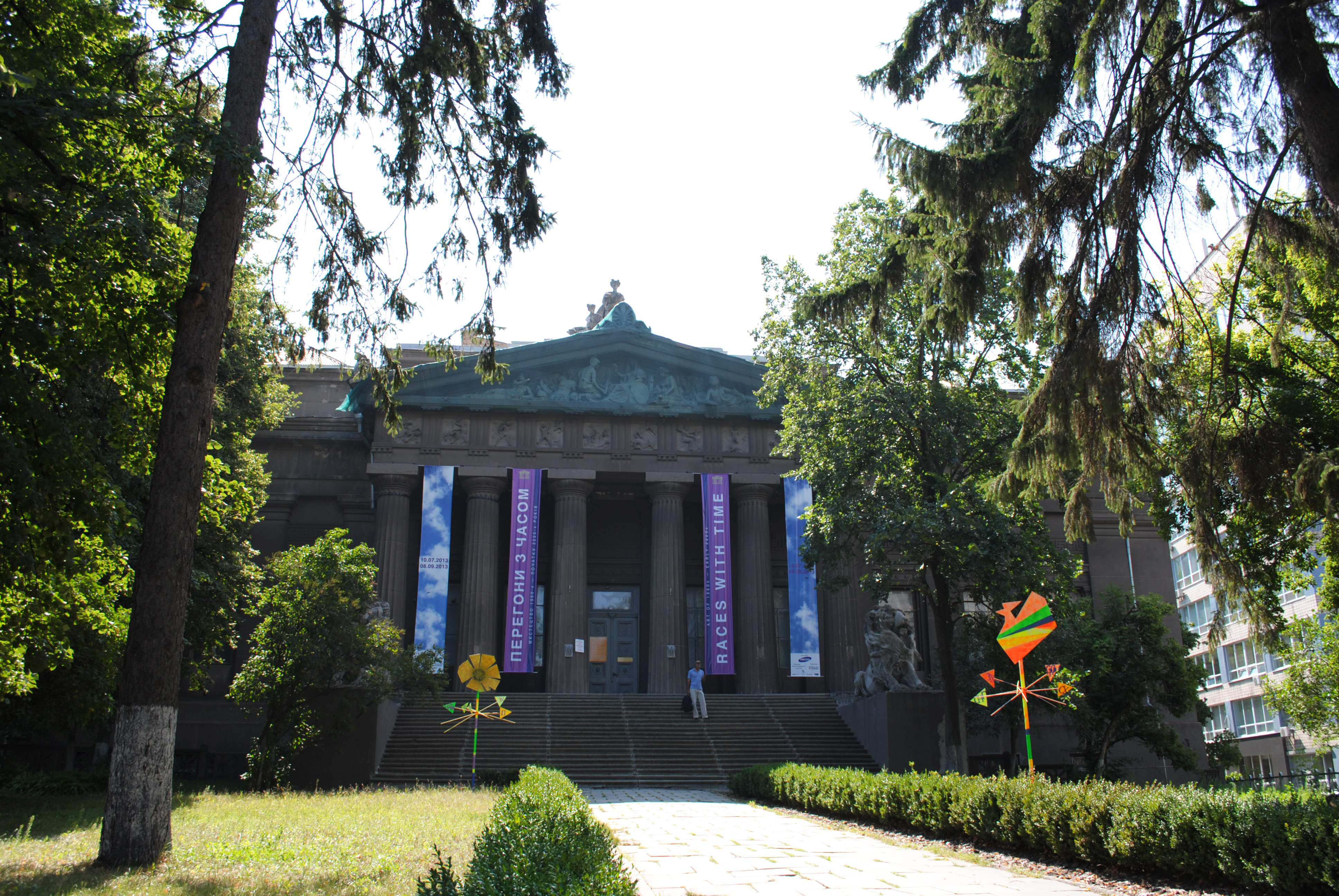 Будинок-музей старожитностей та мистецтв (кол. Художньо-промисловий та науковий музей), Київ, Грушевського Михайла вул., 6